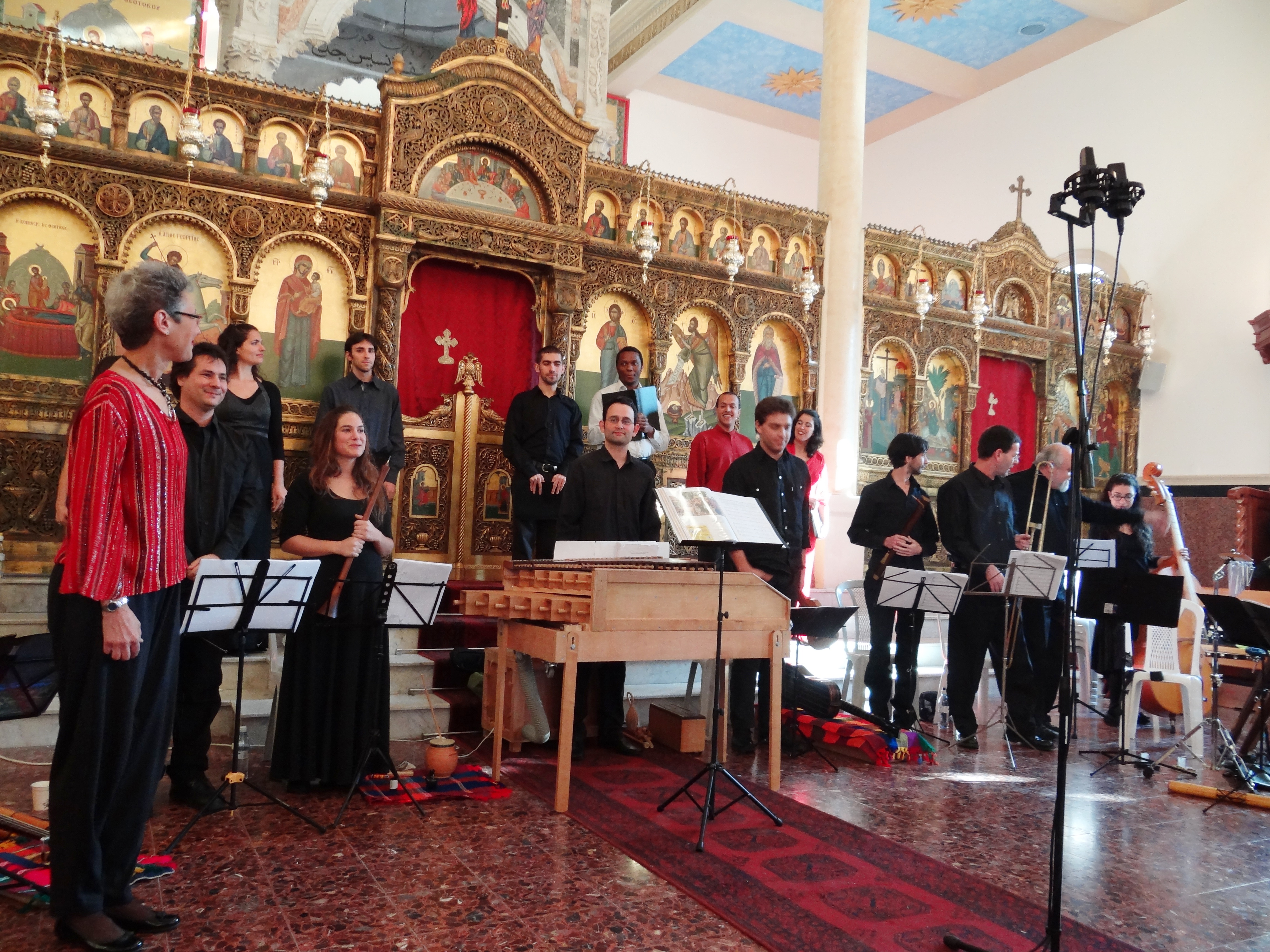 Ensemble Phoenix is a broad, multi-faceted ensemble specialized in early music from Israel אנסמבל פניקס למוזיקה עתיקה הוא גוף רחב-ממדים ורב-פנים, המתמחה במוזיקה עתיקה. מבצעת את מיסה זפוטק בפסטיבל החג של החגים בחיפה. המנצחת היר מירנה הרצוג מייסדת האנסמבל